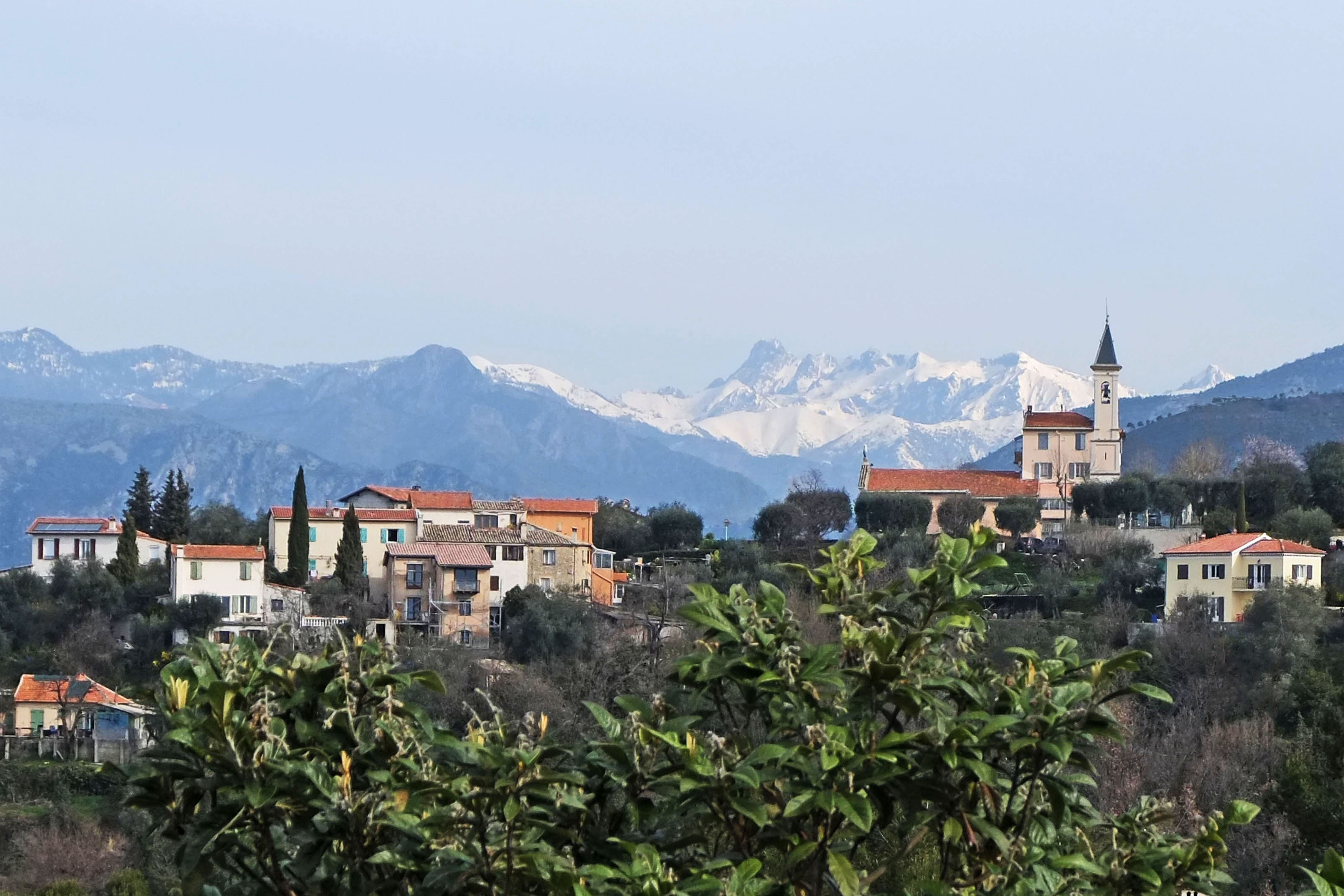 Vue sur l'église de Colomars depuis la route de Nice